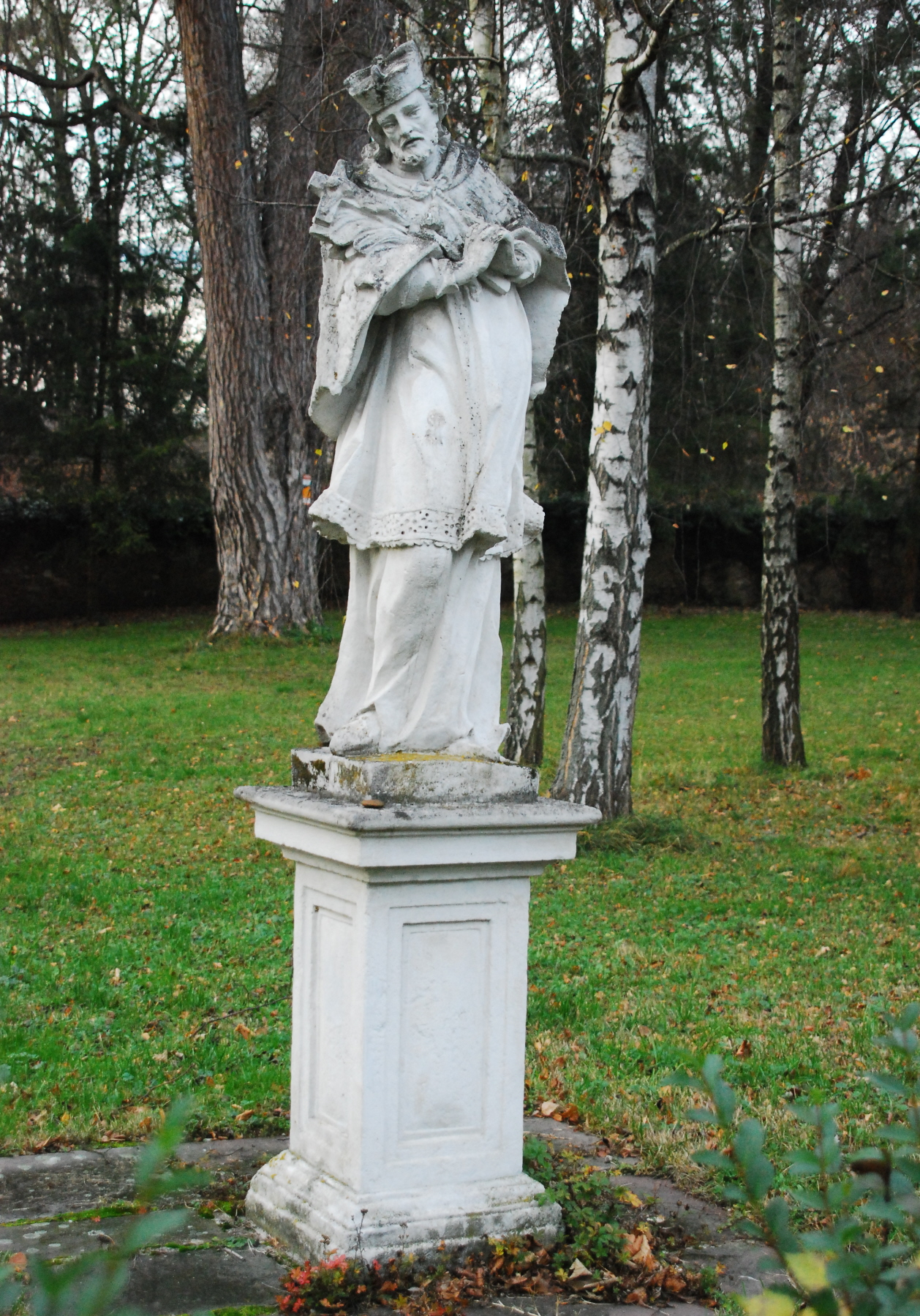 Johannes-Nepomuk-Statue bei der Mauerbachbrücke beim Laudon-Schlössel